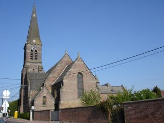 Église Saint Philippe.